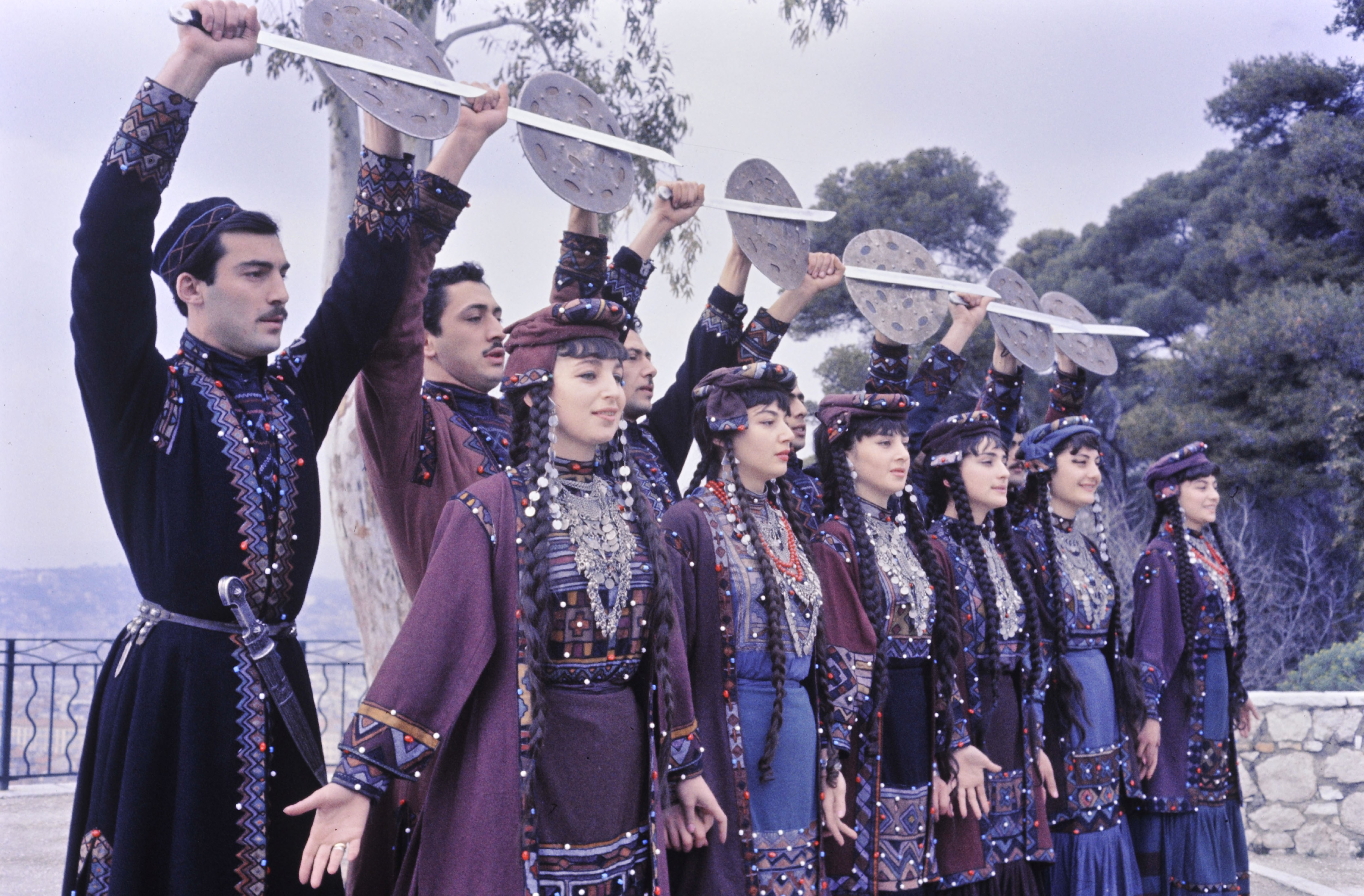 Danses de Géorgie. 1965 : photographies / Roger Pic